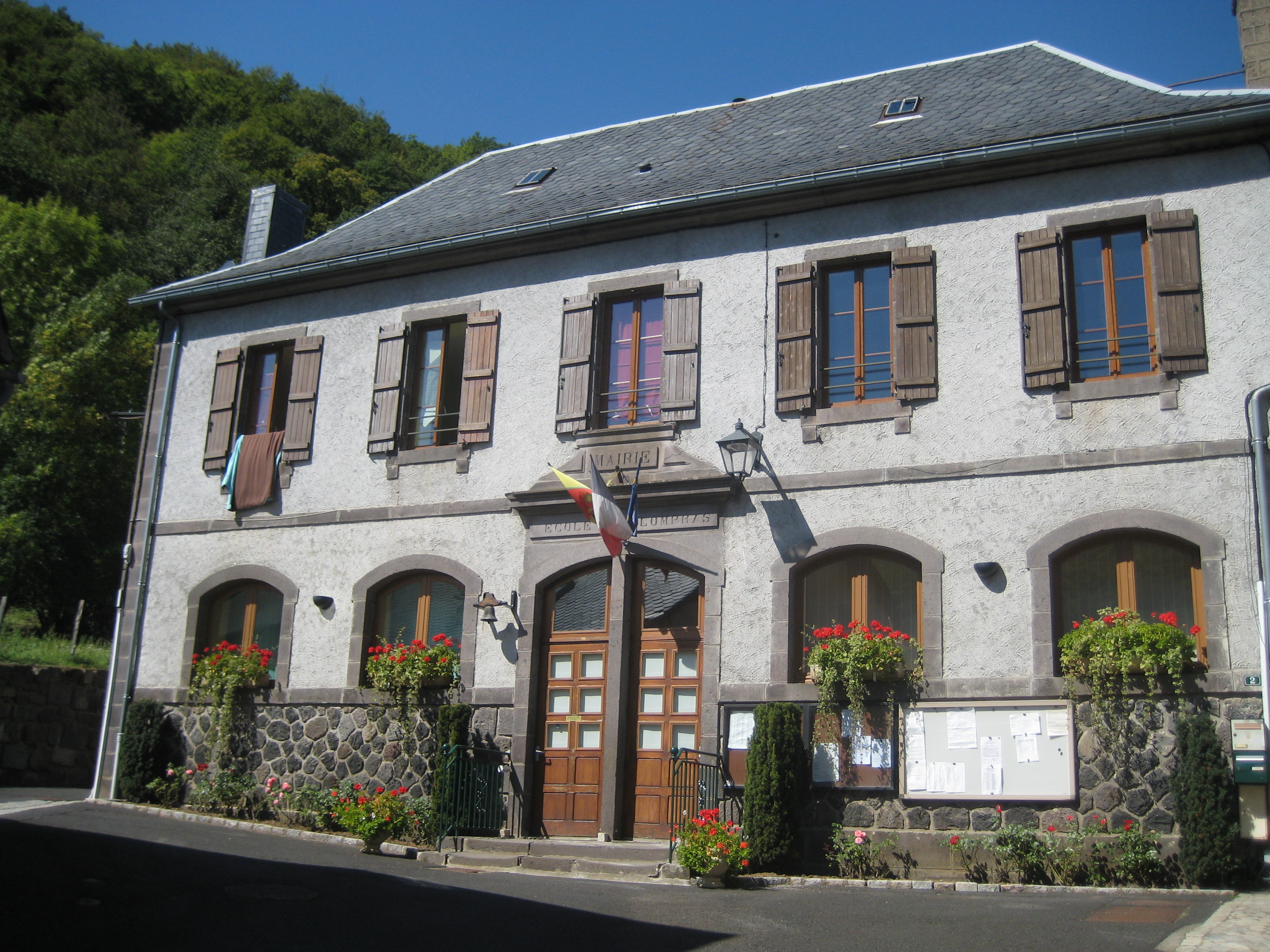 Mairie de Saint-Pierre-Colamine